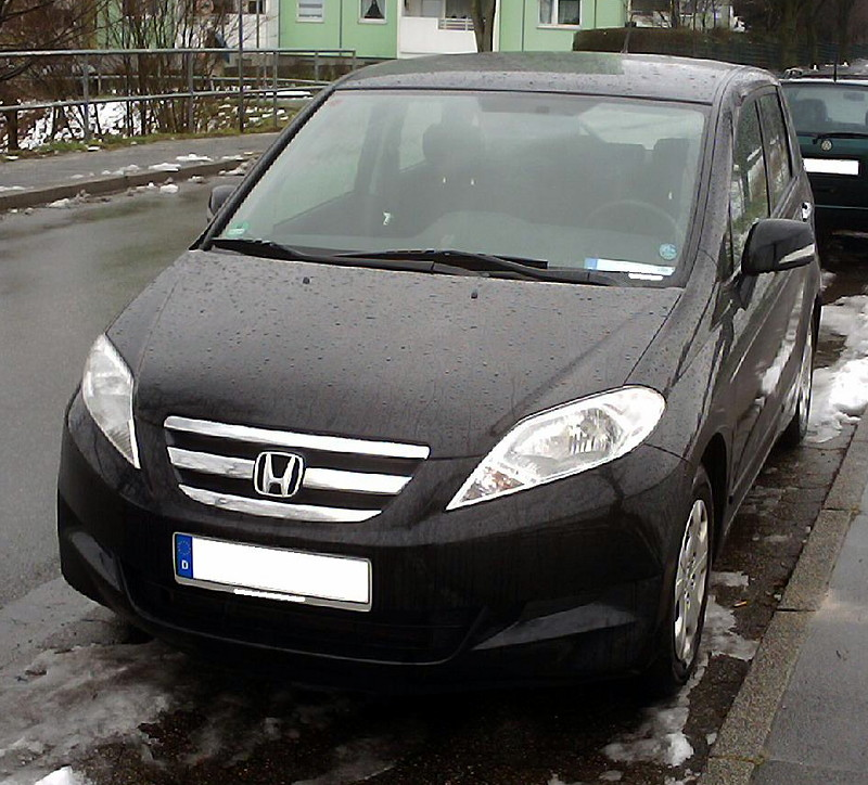 Honda FR-V